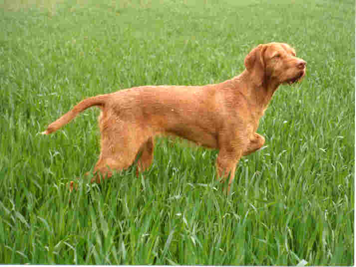 Magyar Vizsla Drahthaar